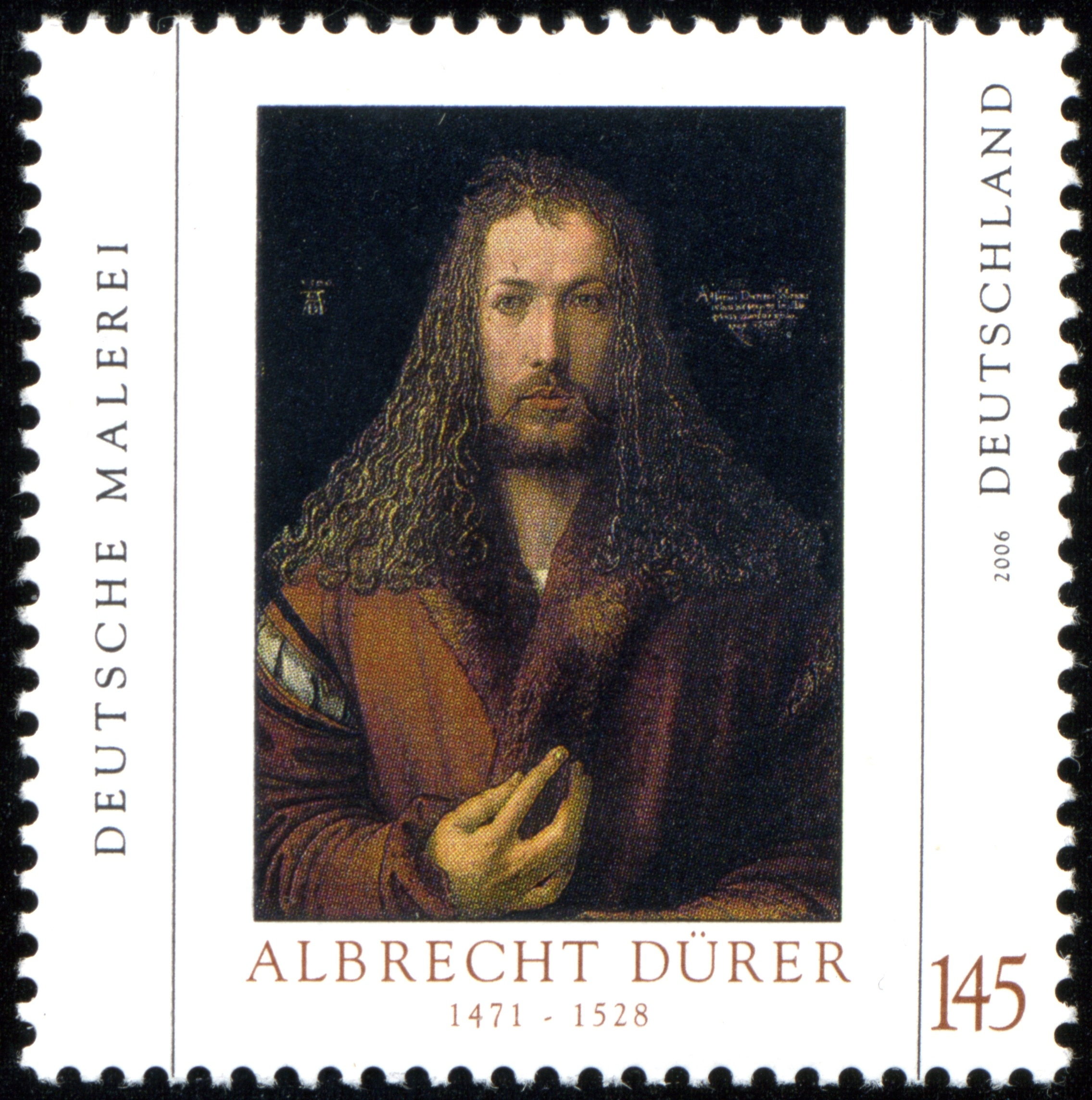 Briefmarke Dürer Deutschland 2006 Michel-Nr. 2531